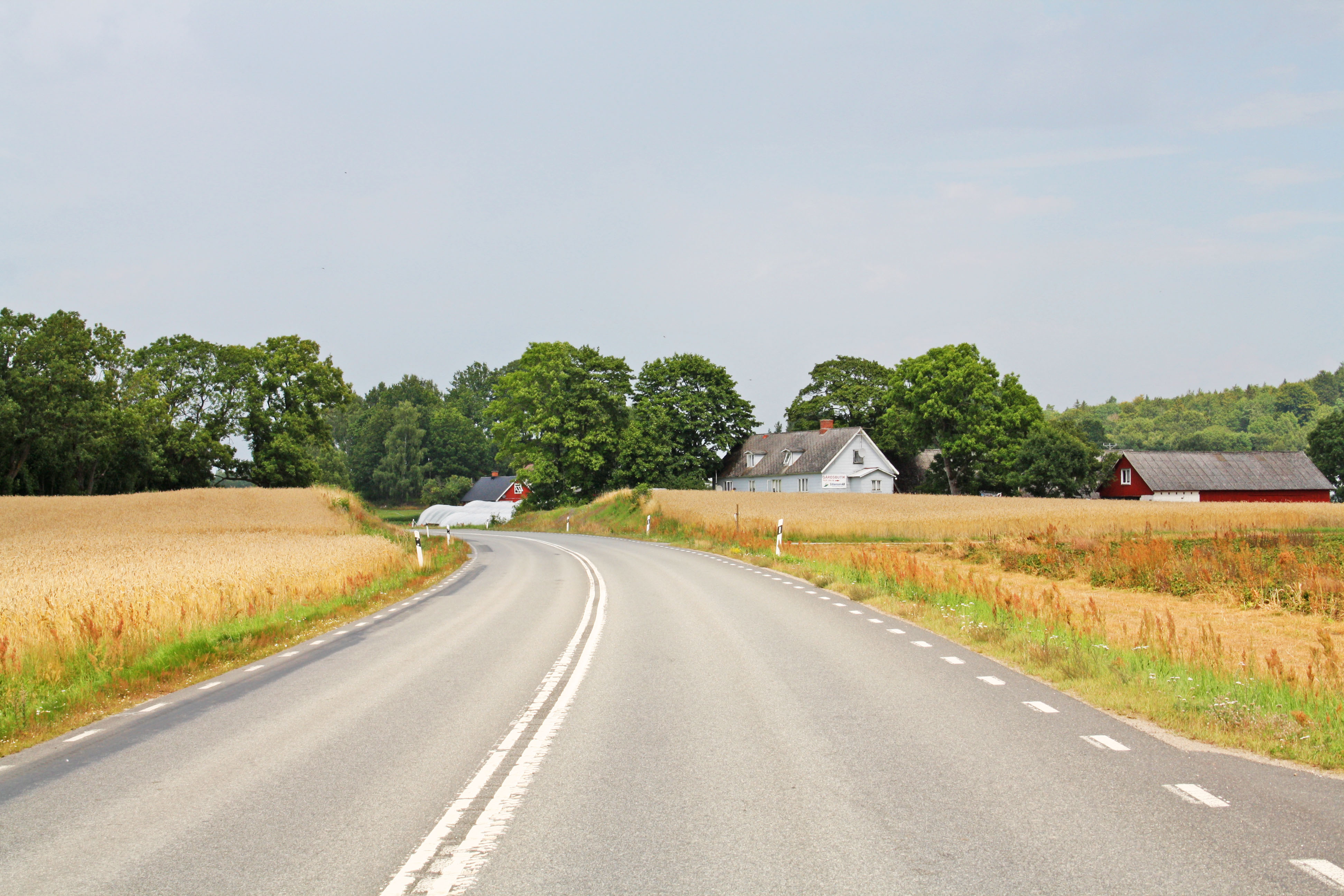 Länsväg 116 vid Östad, mellan Näsum och Jämshög.